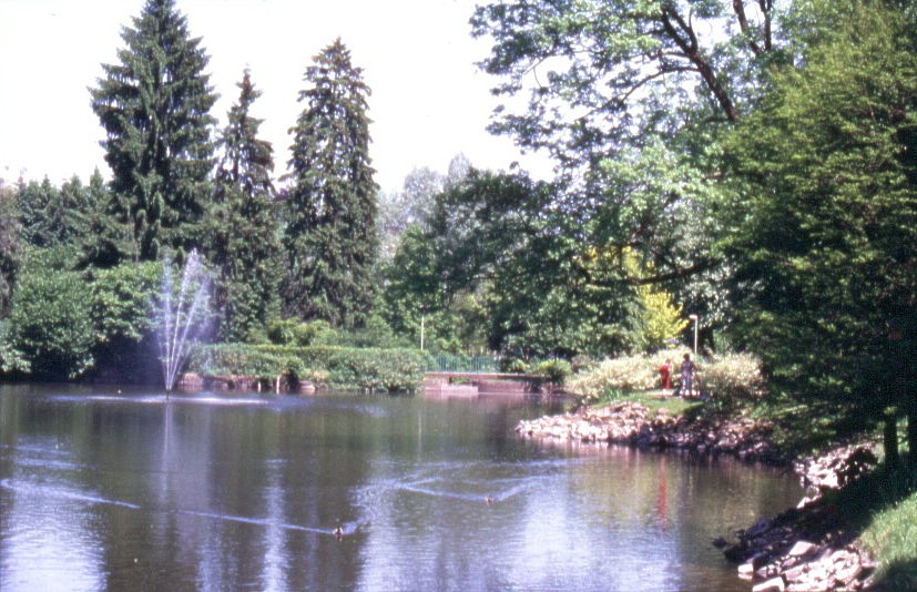 Schwanenteich im Stadtpark von Hückeswagen GFDL von der Stadt Hückeswagen zur Verfügung gestellt am 27.09.2004